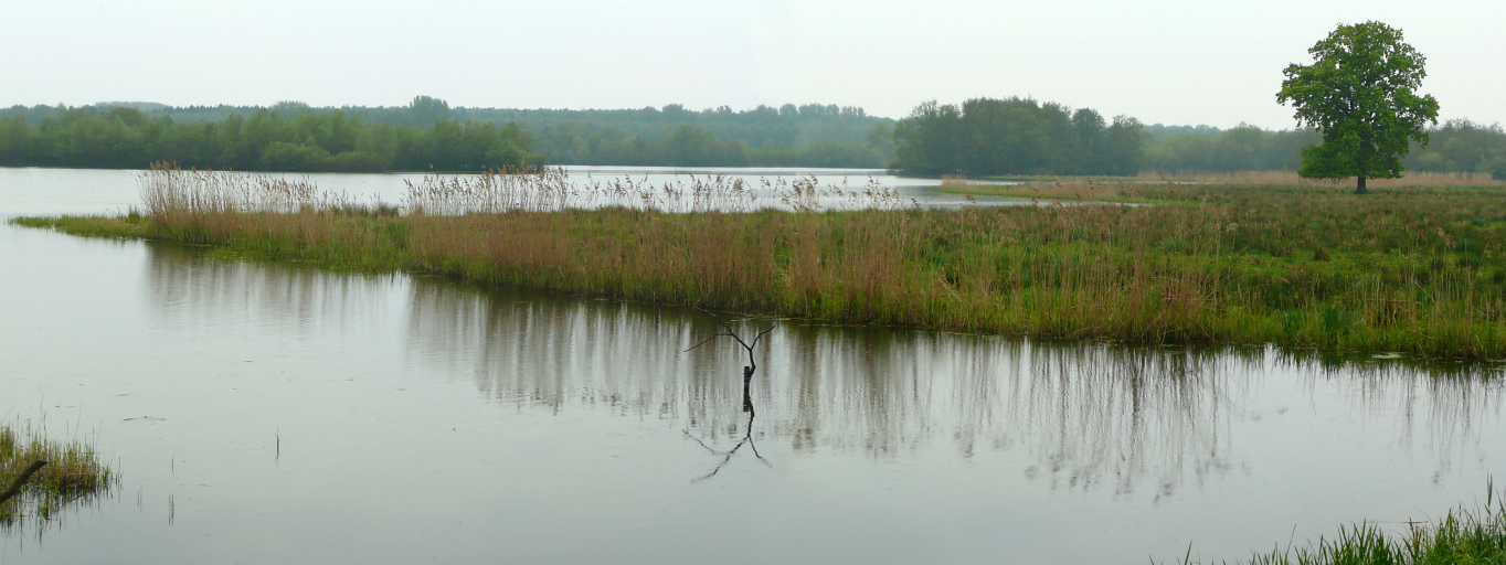 Naturschutzgebiet Ilkerbruch, Wasserfläche